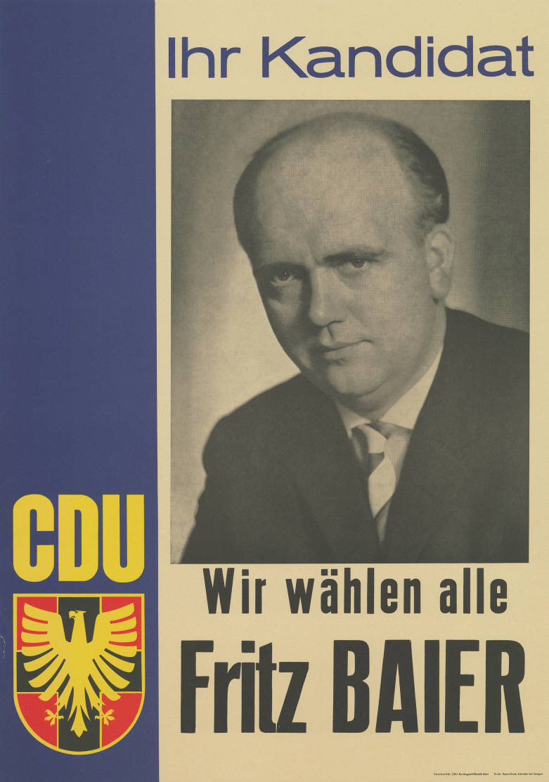 Ihr Kandidat CDU Wir wählen alle Fritz Baier Abbildung: Porträtfoto Plakatart: Kandidaten-/Personenplakat mit Porträt Auftraggeber: Verantw.: CDU-Bundesgeschäftsstelle Bonn Drucker_Druckart_Druckort: Repro-Druck, Schmiden bei Stuttgart Objekt-Signatur: 10-001 : 1099.20 Bestand: Plakate zu Bundestagswahlen (10-001) GliederungBestand10-18: Plakate zu Bundestagswahlen (10-001) » Die 4. Bundestagswahl am 17. September 1961 » CDU » Mit Porträtfoto Lizenz: KAS/ACDP 10-001 : 1099.20 CC-BY-SA 3.0 DE